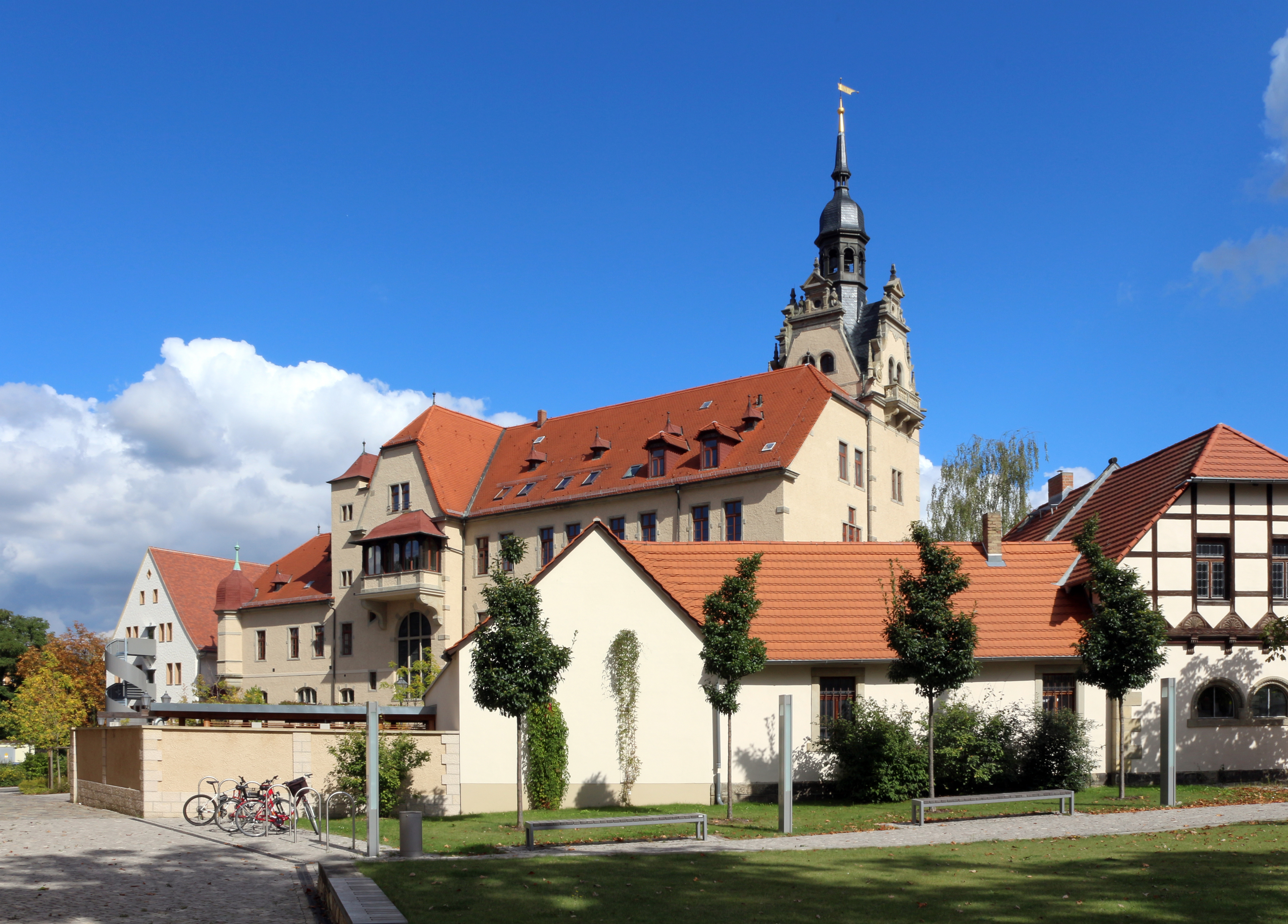 Rathaus Bernburg